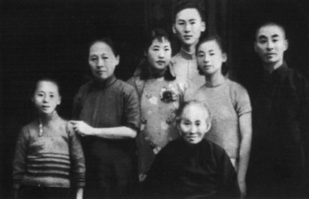 {叶圣陶在四川乐山的“合家欢” }